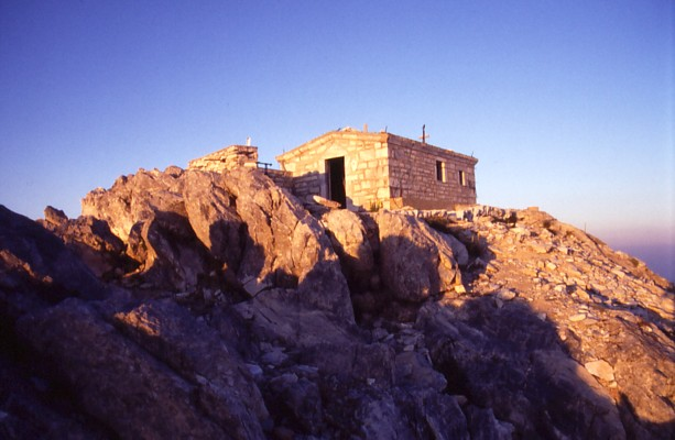 Der Gipfelbereich des Athos und die Gipfelkapelle